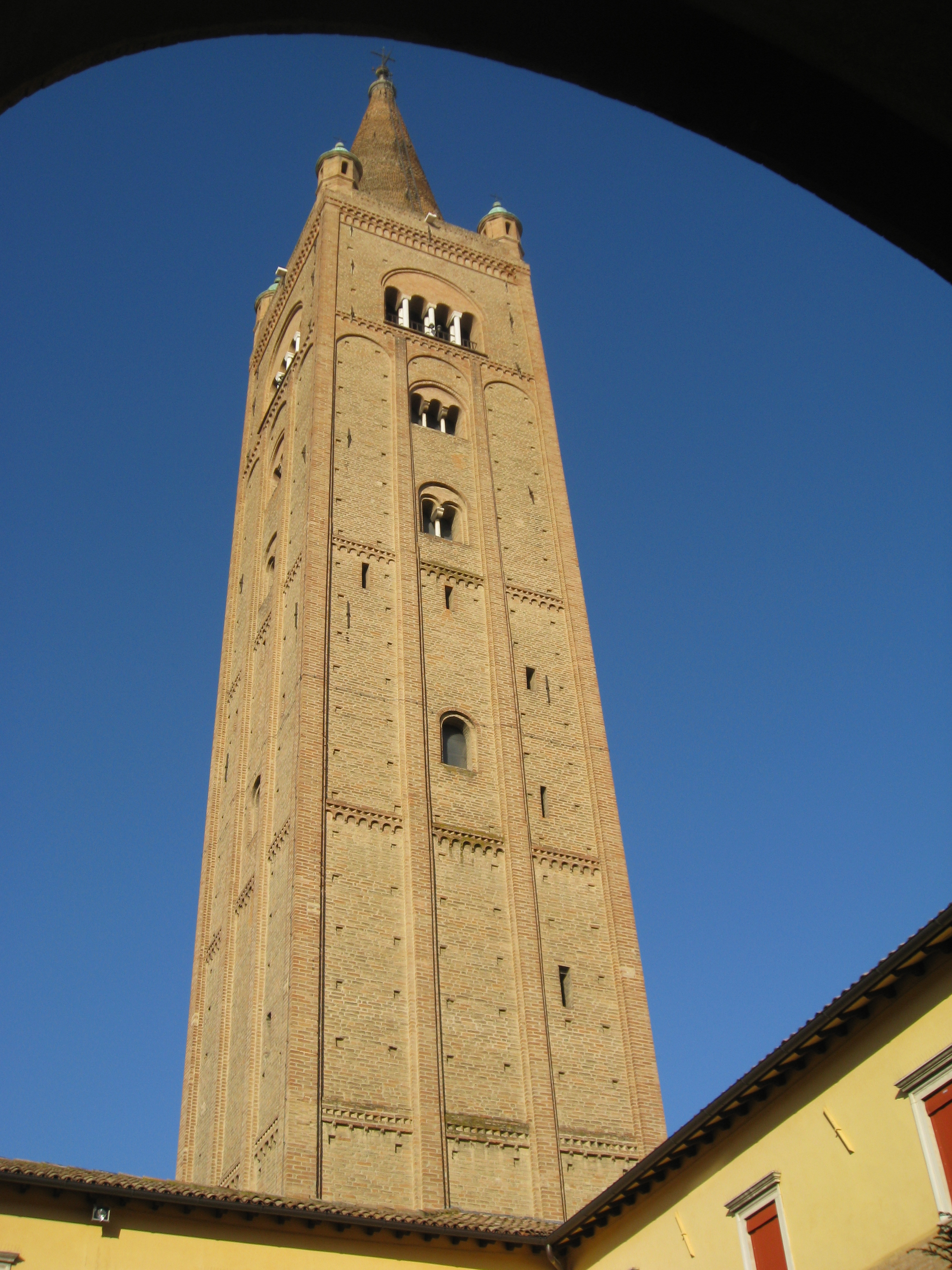 Perkele, propria, Campanile di San Mercuriale visto dal chiostro